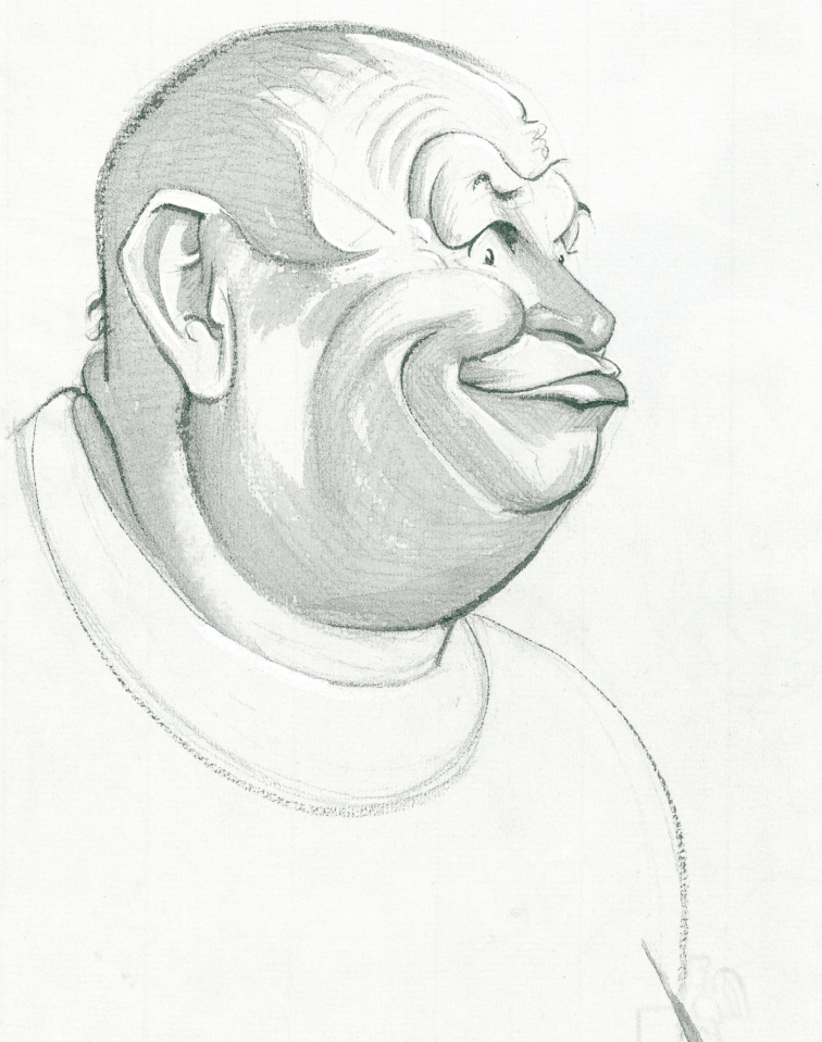 Karikaturzeichnung des Schauspielers Gert Fröbe